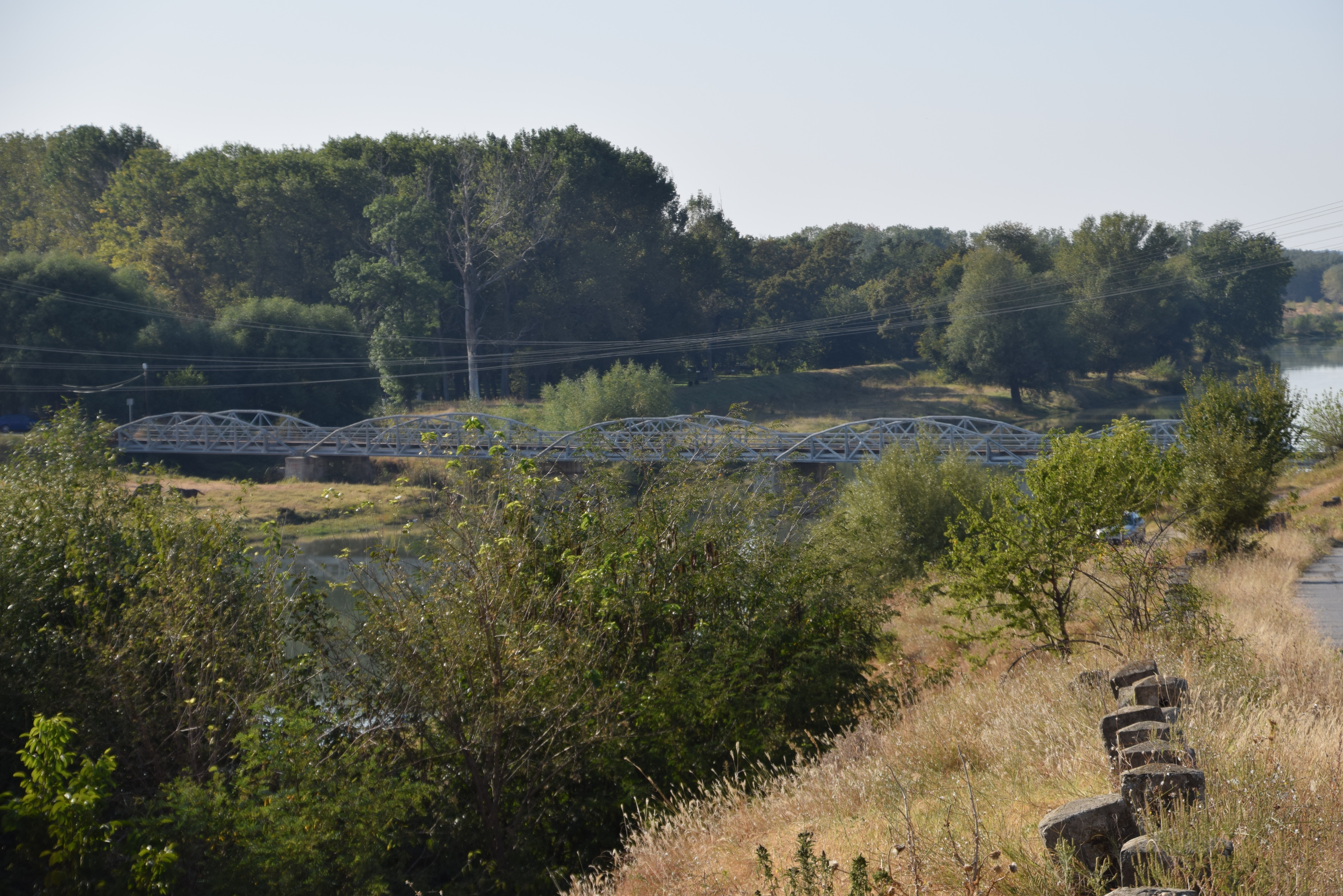 Podul metalic peste râul Vedea